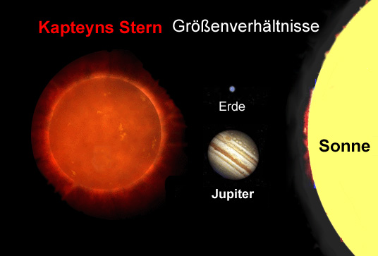 Kapteyns-stern